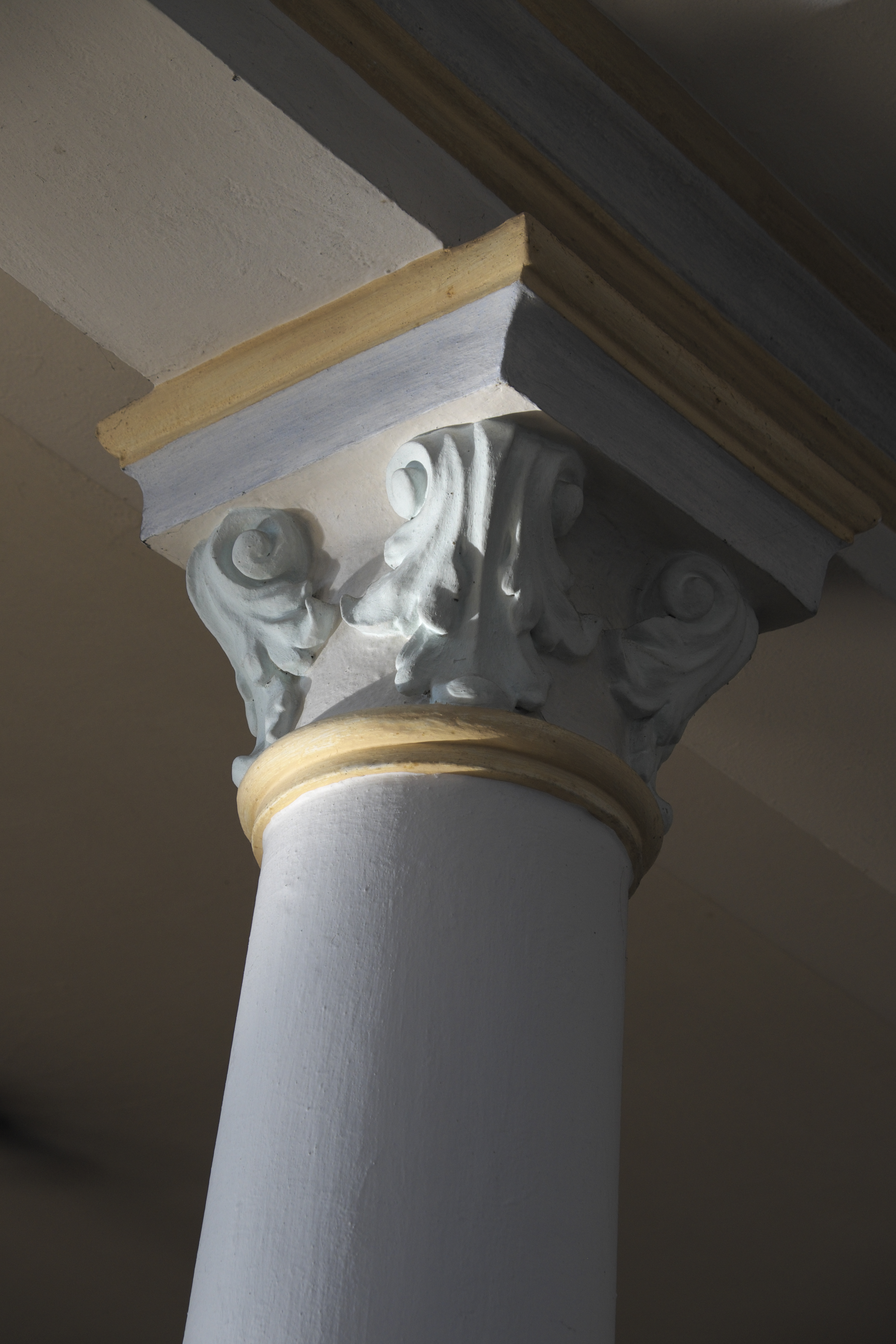 Katholische Pfarrkirche St. Martin in Penzing im Landkreis Landsberg am Lech (Bayern/Deutschland), Säule unter der Empore, Kapitell